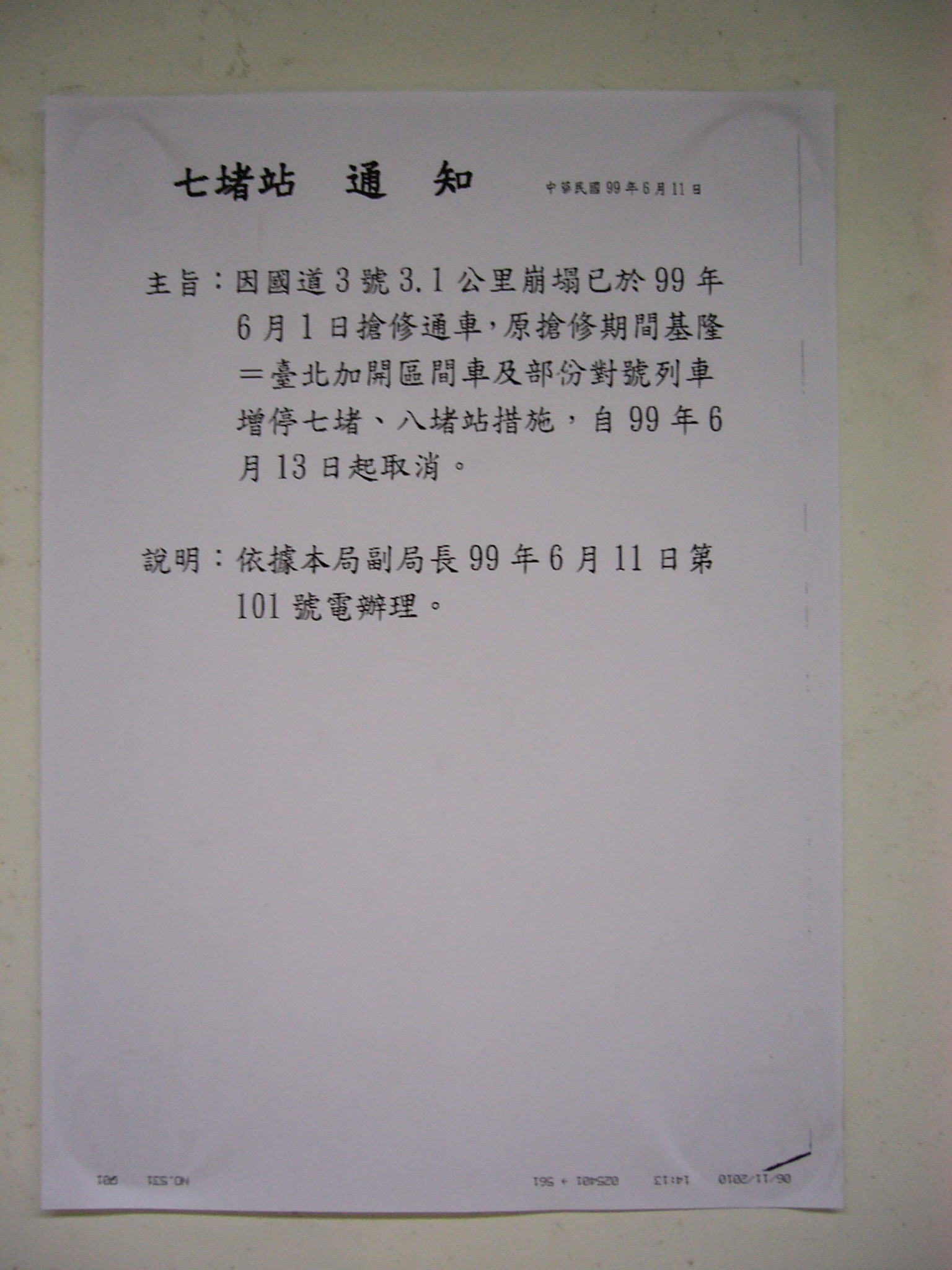 2010年國道三號3.1公里山崩事件過後，福爾摩沙高速公路已於2010年6月1日恢復通車，臺灣鐵路管理局遂公告：2010年6月13日起，取消原搶修期間在基隆車站及臺北車站間加開之區間車，及部分對號列車增停七堵車站、八堵車站。